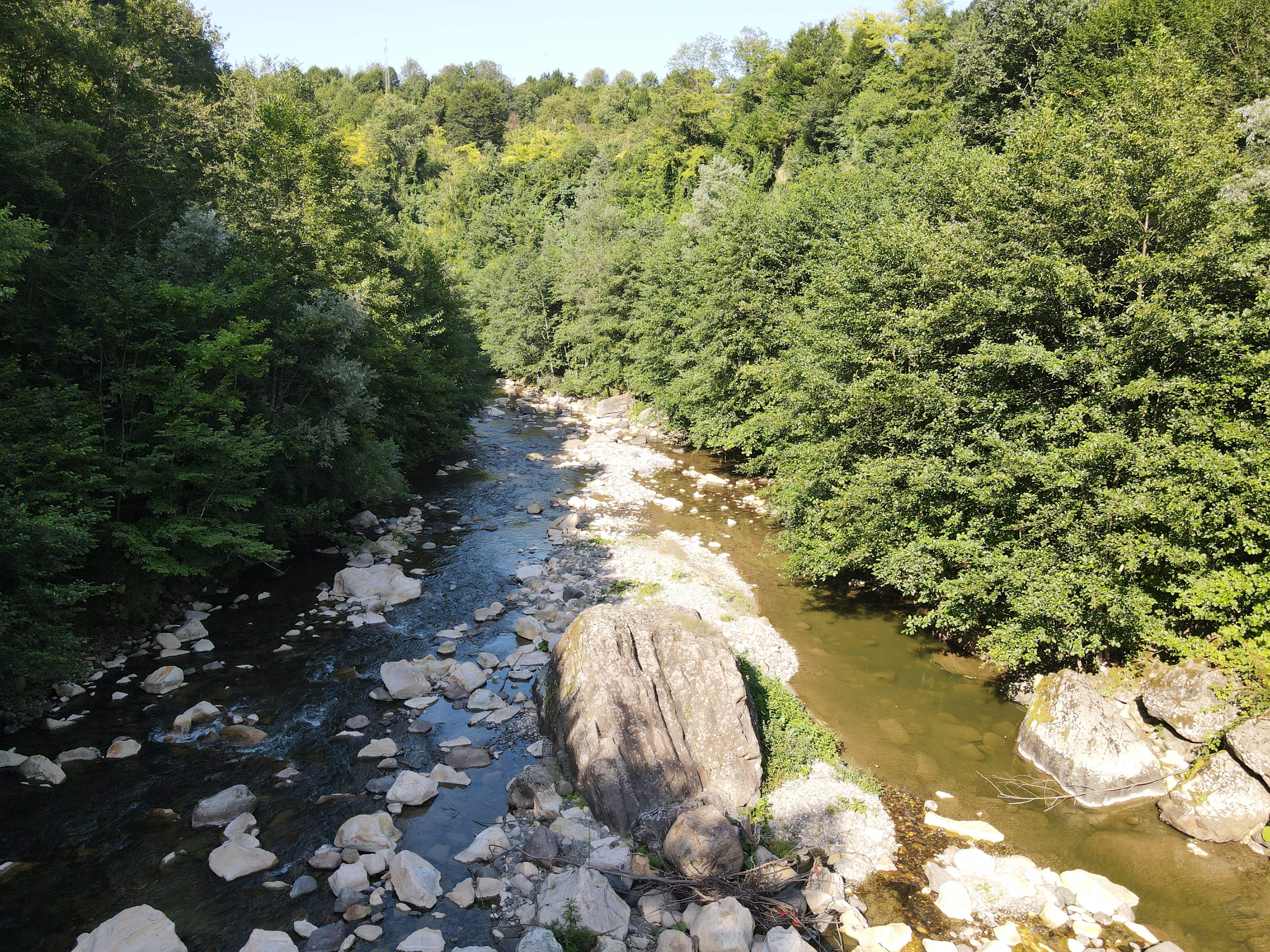 Alivara köyünün deresi